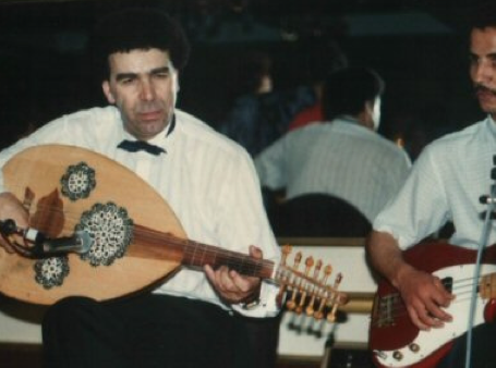 An Algerian Chaabi performer